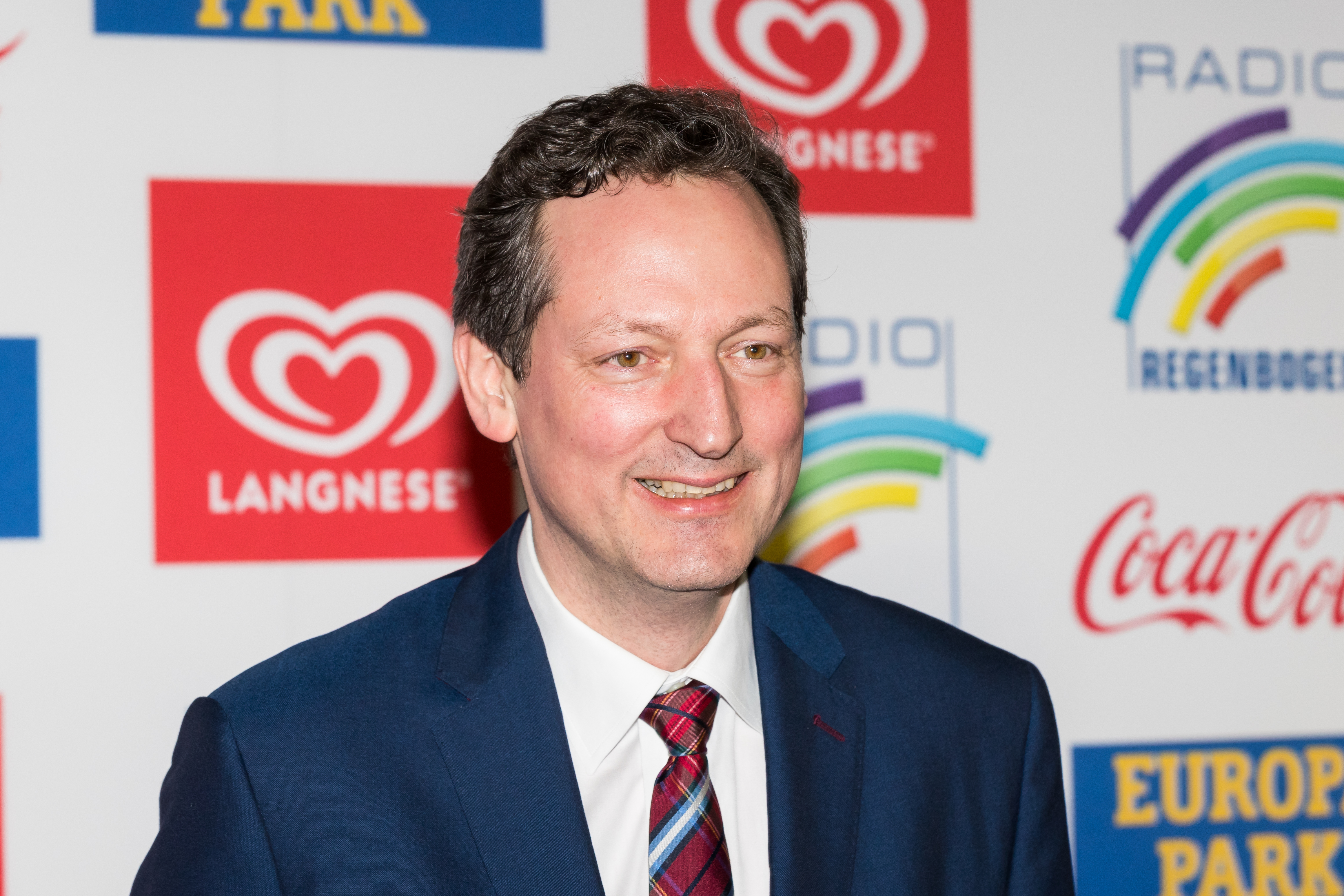 during Radio Regenbogen Award 2018 at Europapark, Rust, Baden-Württemberg, Germany on 2018-03-23, Photo: Sven Mandel